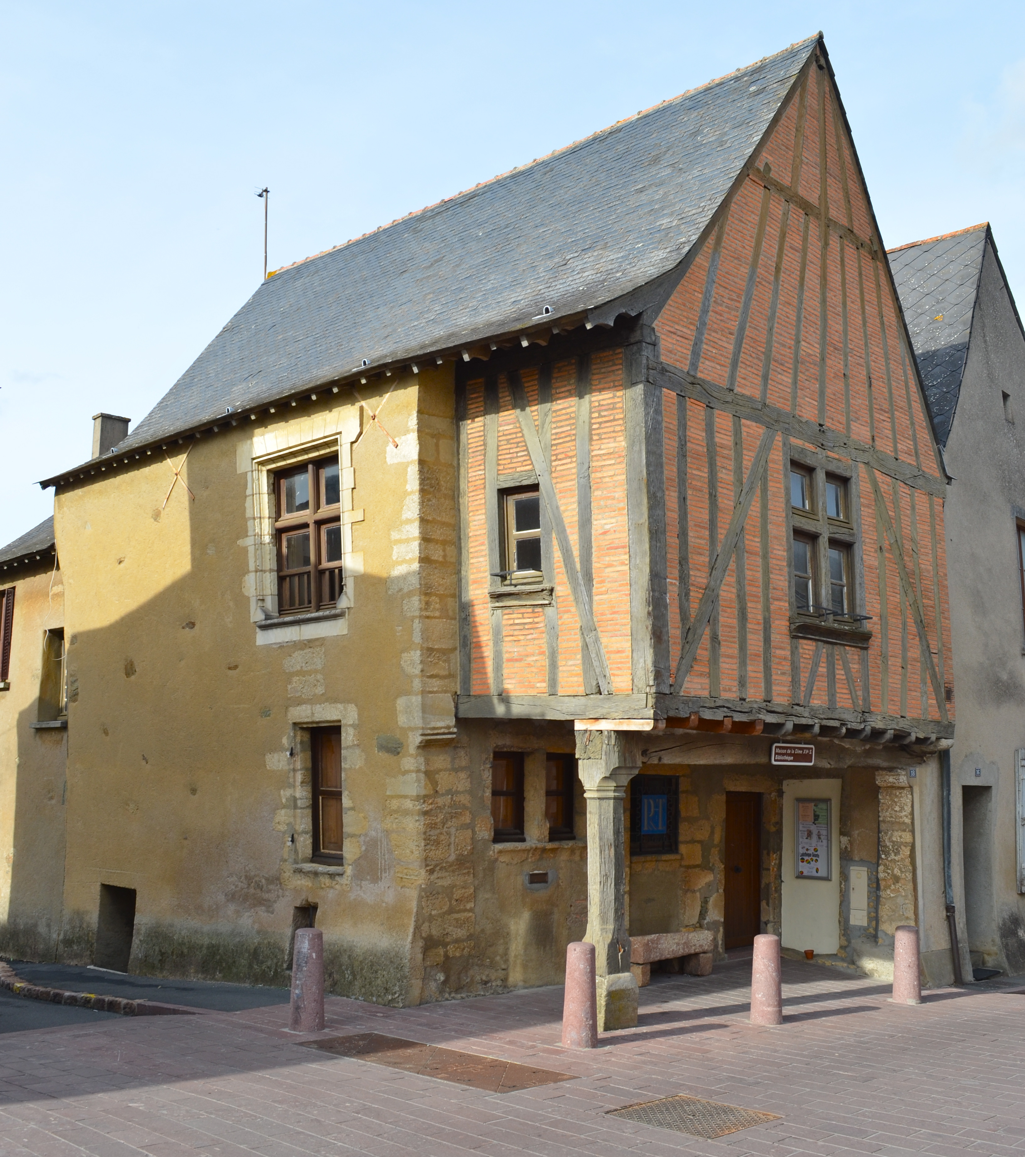 La maison de la Dîme - Rablay-sur-Layon (Maine-et-Loire)